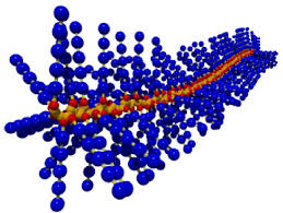 đây là phân tử POLYMER, nó khá đồ sộ, dài